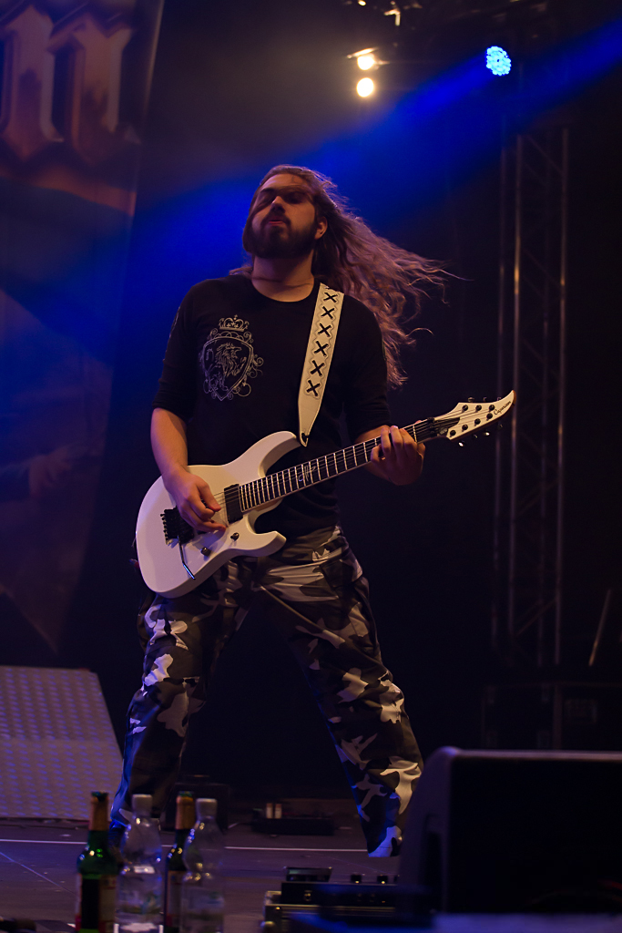 Sabaton - Beastival 2013 - 01-06-2013